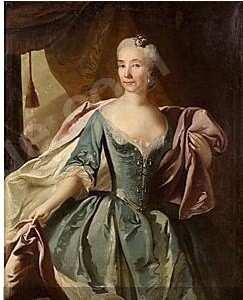 Sofia Elisabeth Ridderschantz